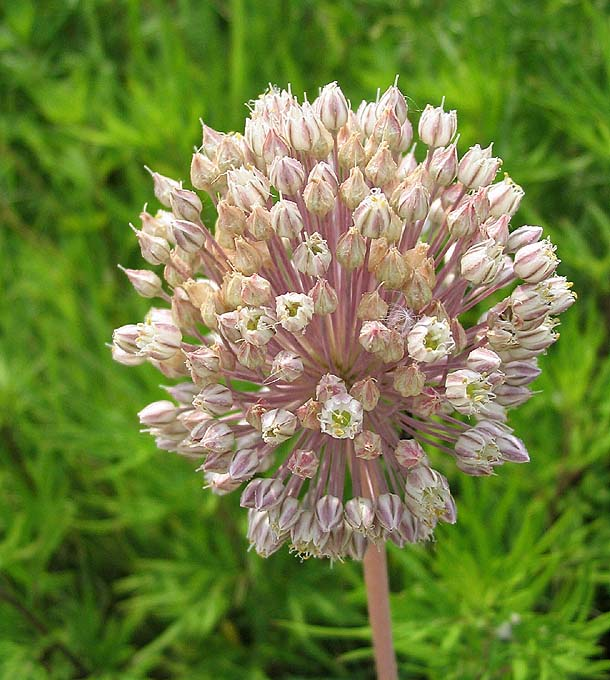 Allium ampeloprasum (poireau d'été). Photo prise à Ille-sur-Têt en juin 2004